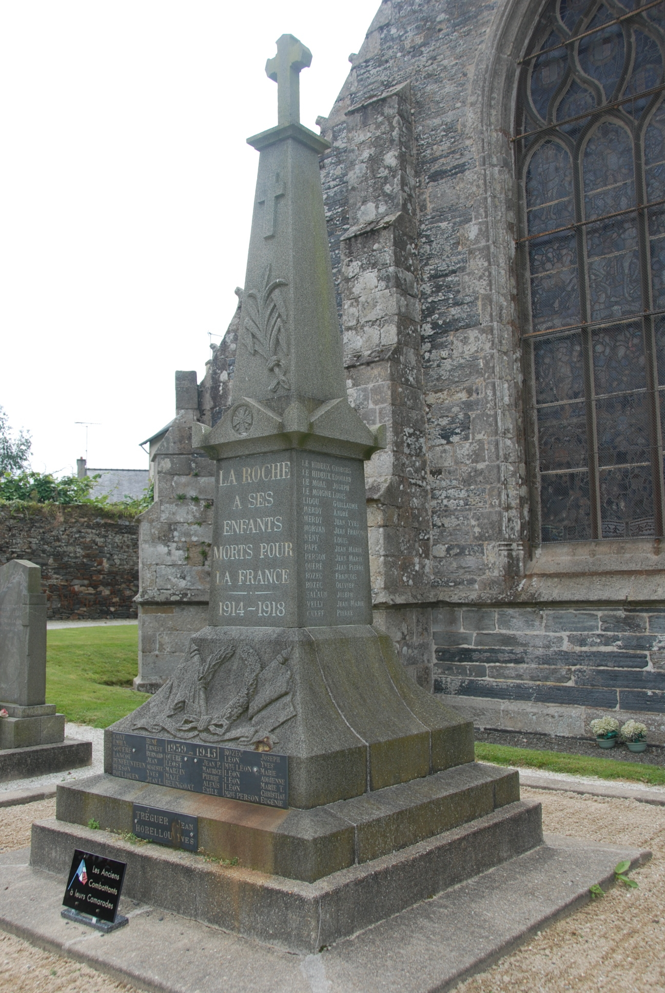 Monument aux morts - La Roche Maurice-29